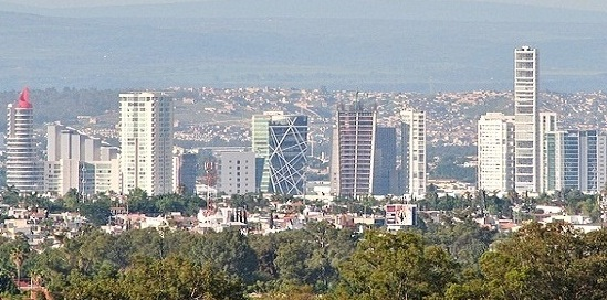 Clima Gdl 16 feb 2013 - Puerta de Hierro (vista oeste)